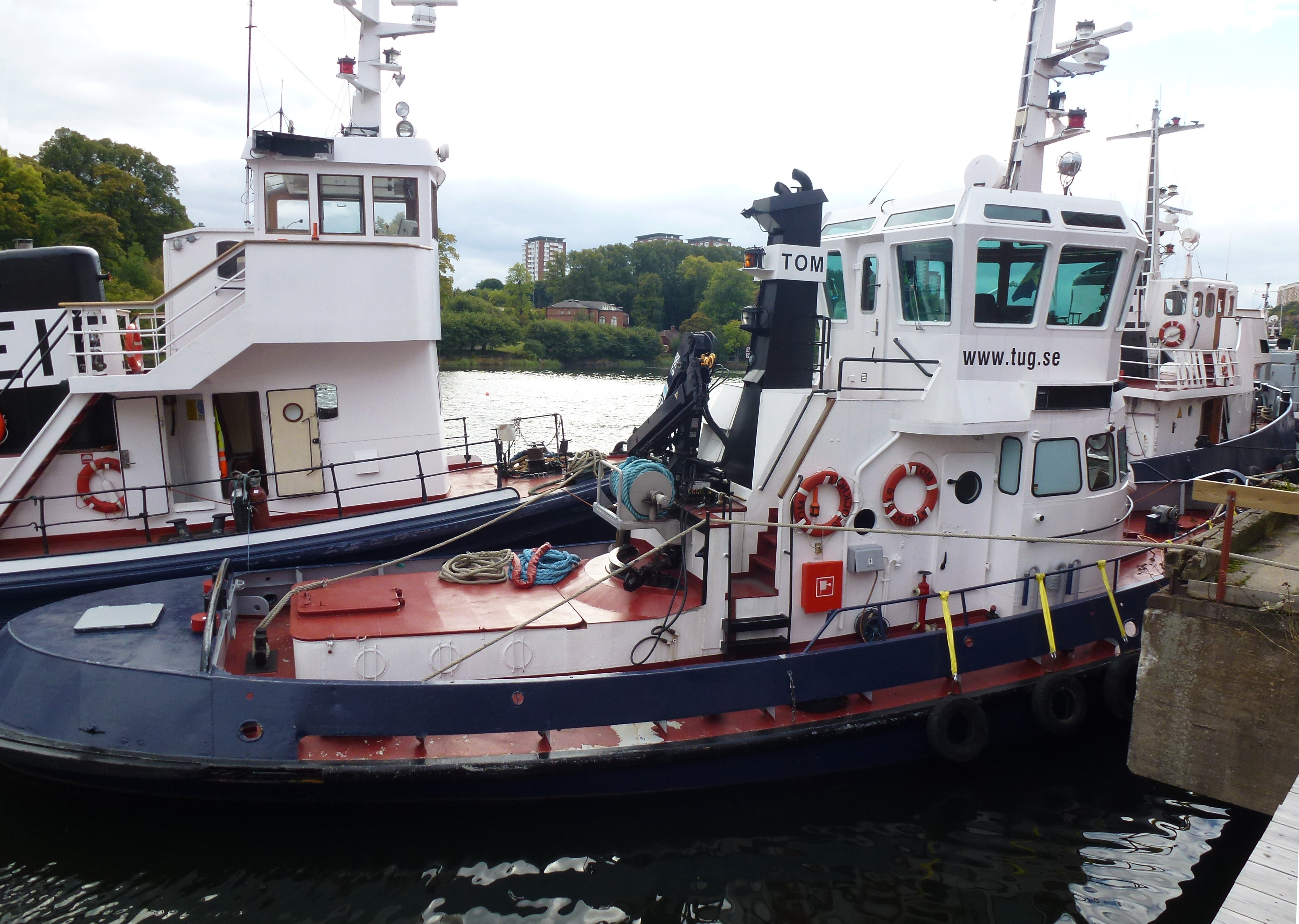 Bågserbåt TOM i Gäddviken